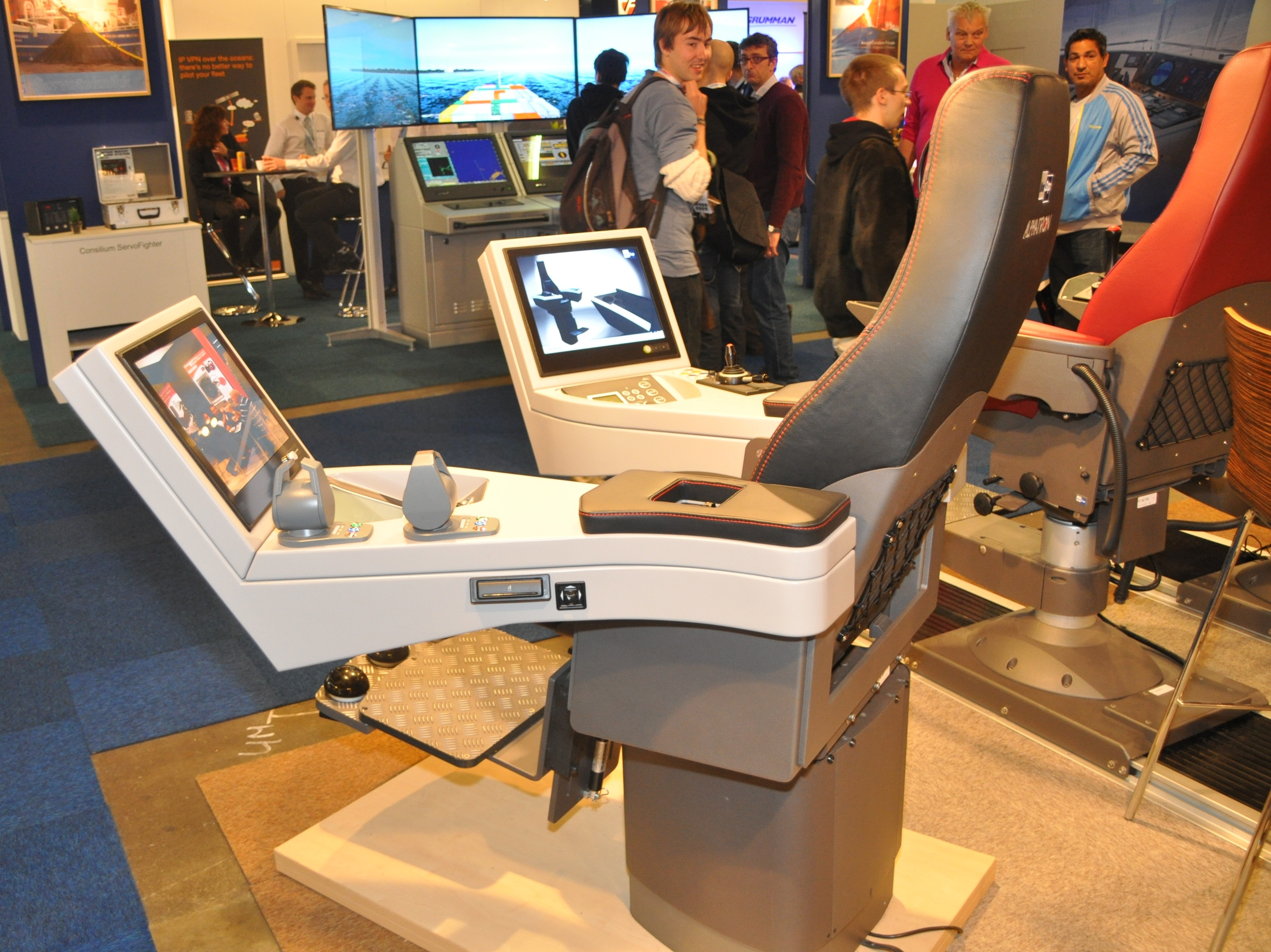 Equipment for the shipping industry